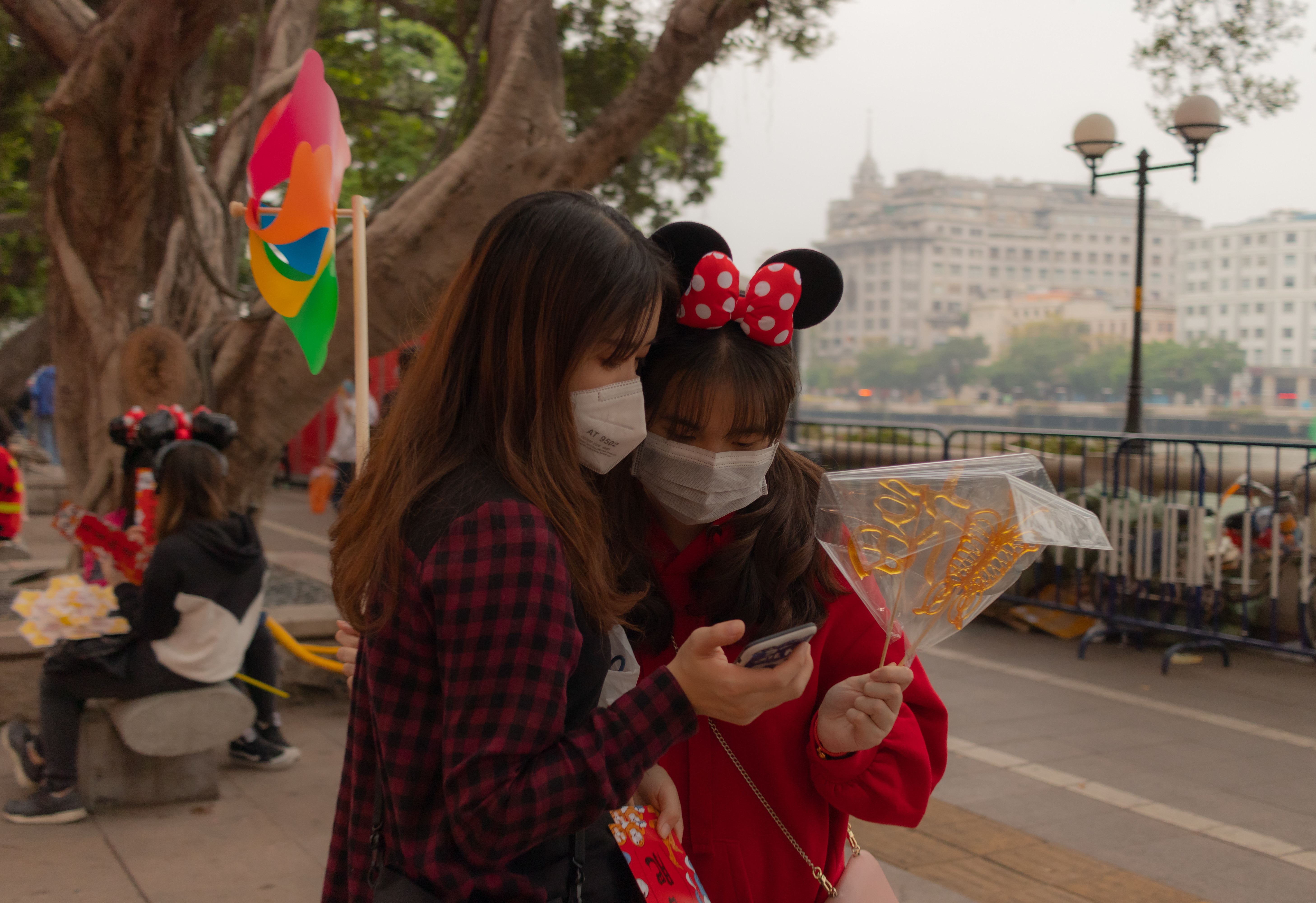 Spring Festival Under Mask